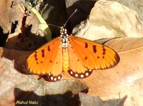 Rahul Natu